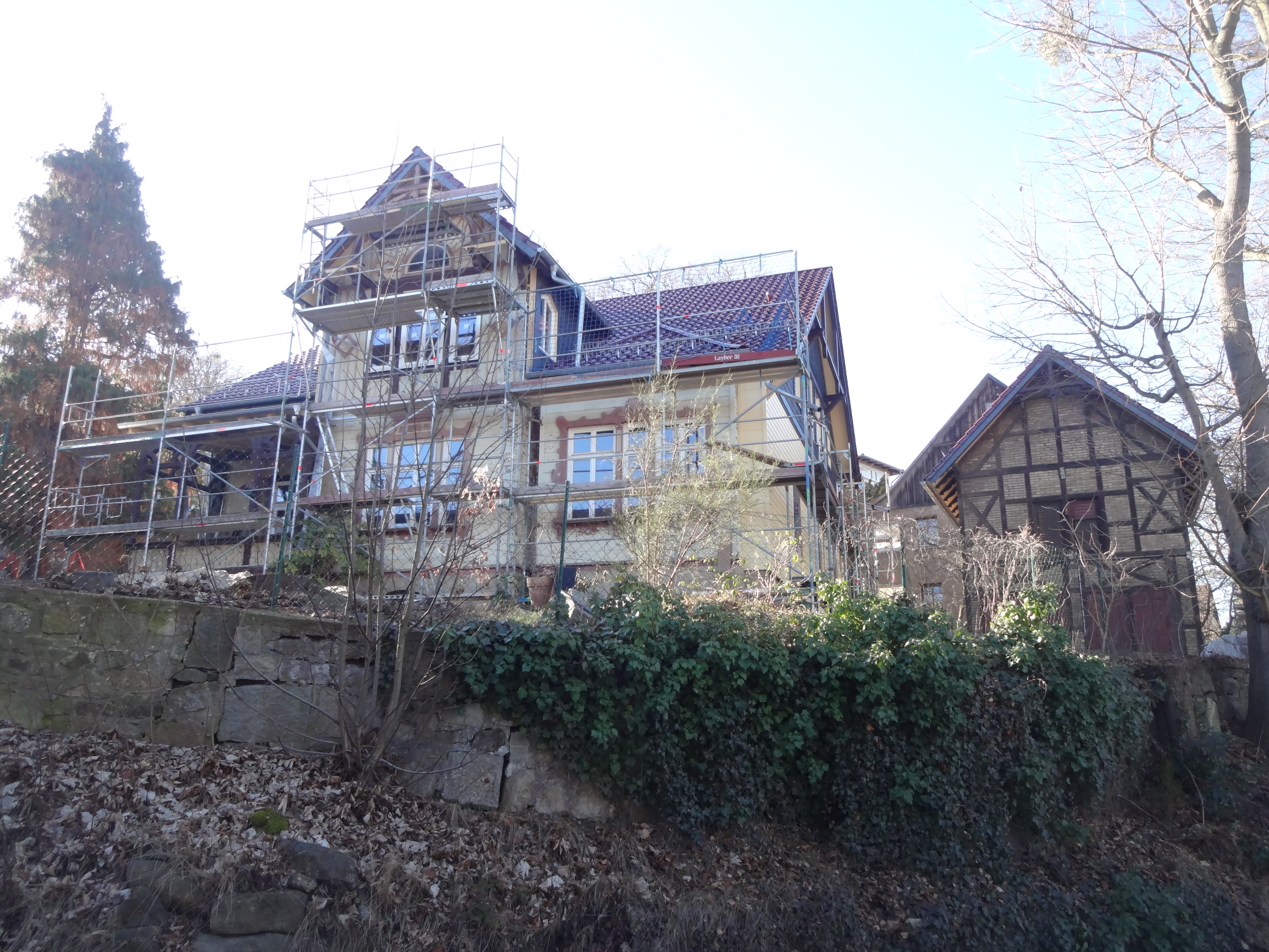 ehemals denkmalgeschütztes Wohnhaus in der Lindenbergstraße 4 in Wernigerode